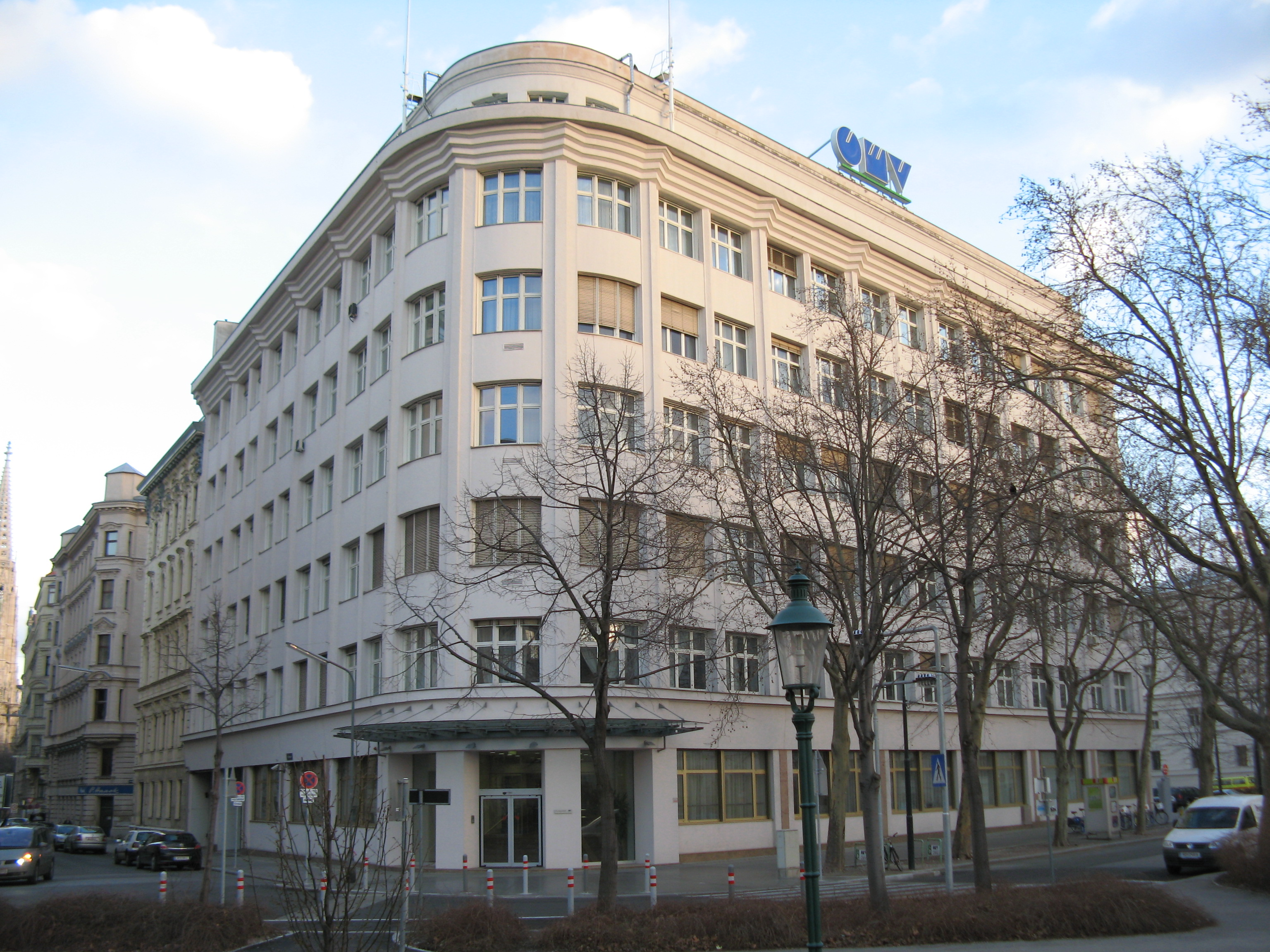 Gebäude der OMV (1928/29) von Ernst Epstein in Wien-Alsergrund